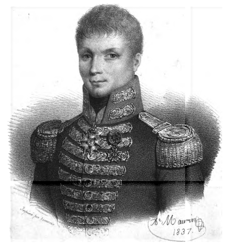 Jean Jacques Étienne Lucas